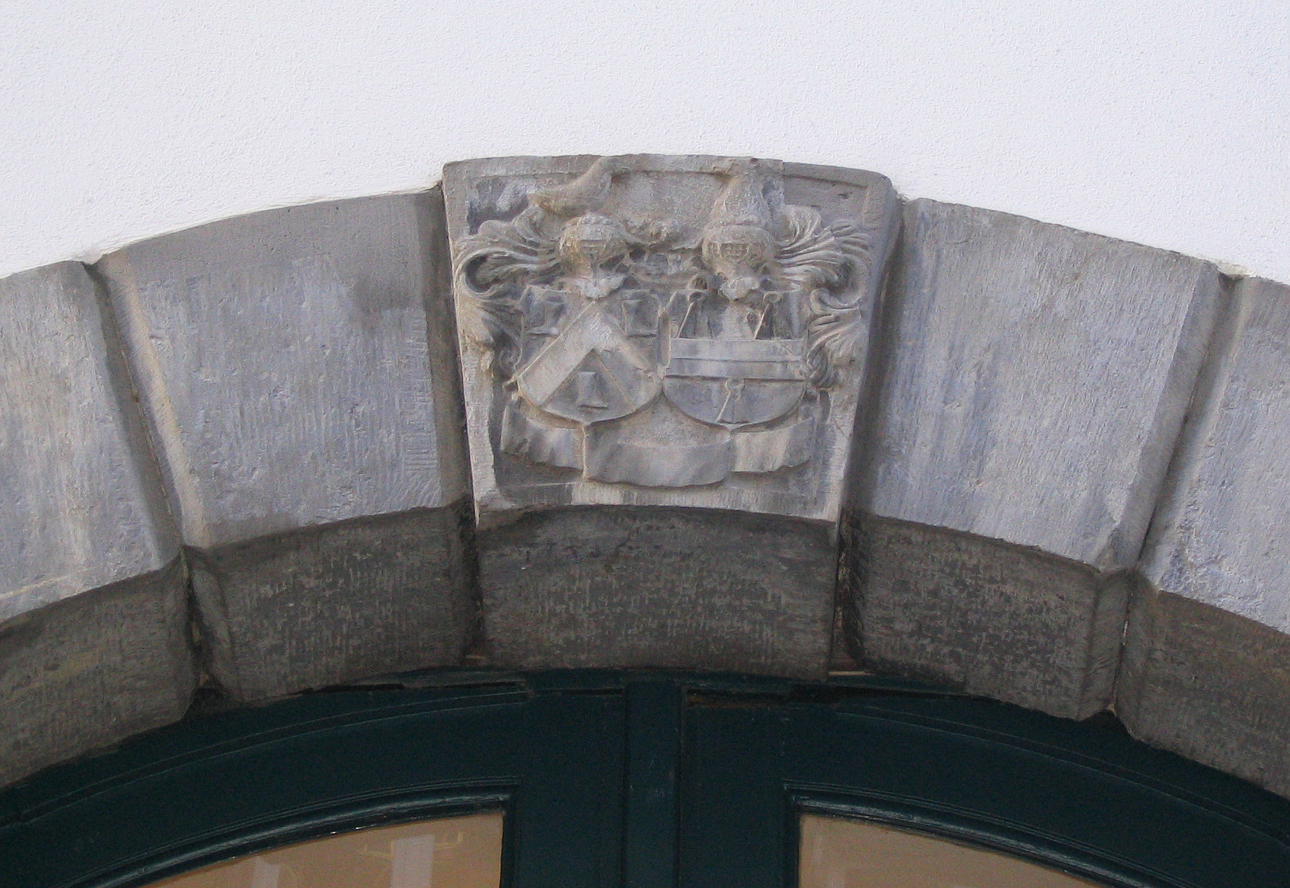 Düsseldorf, Ritterstraße 10, oberhalb der Toreinfahrt.